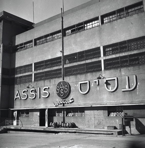 בית חרושת למיצים וריבות "עסיס" ברמת-גן